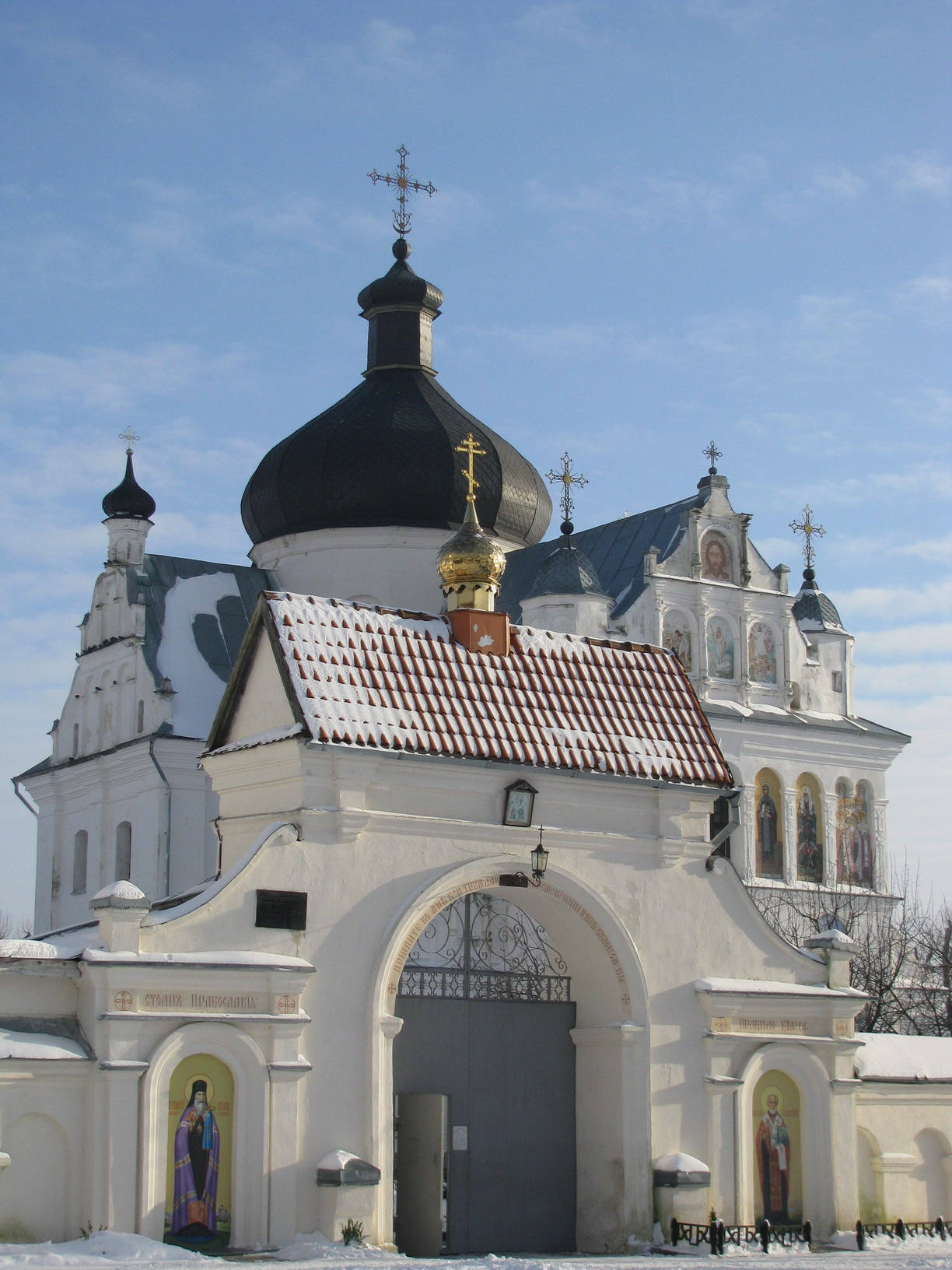 Свято-Никольский монастырь в Могилёве (Беларусь). Вид на ворота храма.